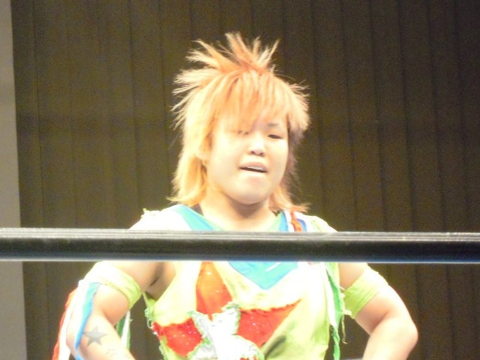 夏樹☆たいよう 2010年5月3日 アイスリボン 後楽園ホール大会 投稿者撮影 Category:人物画像